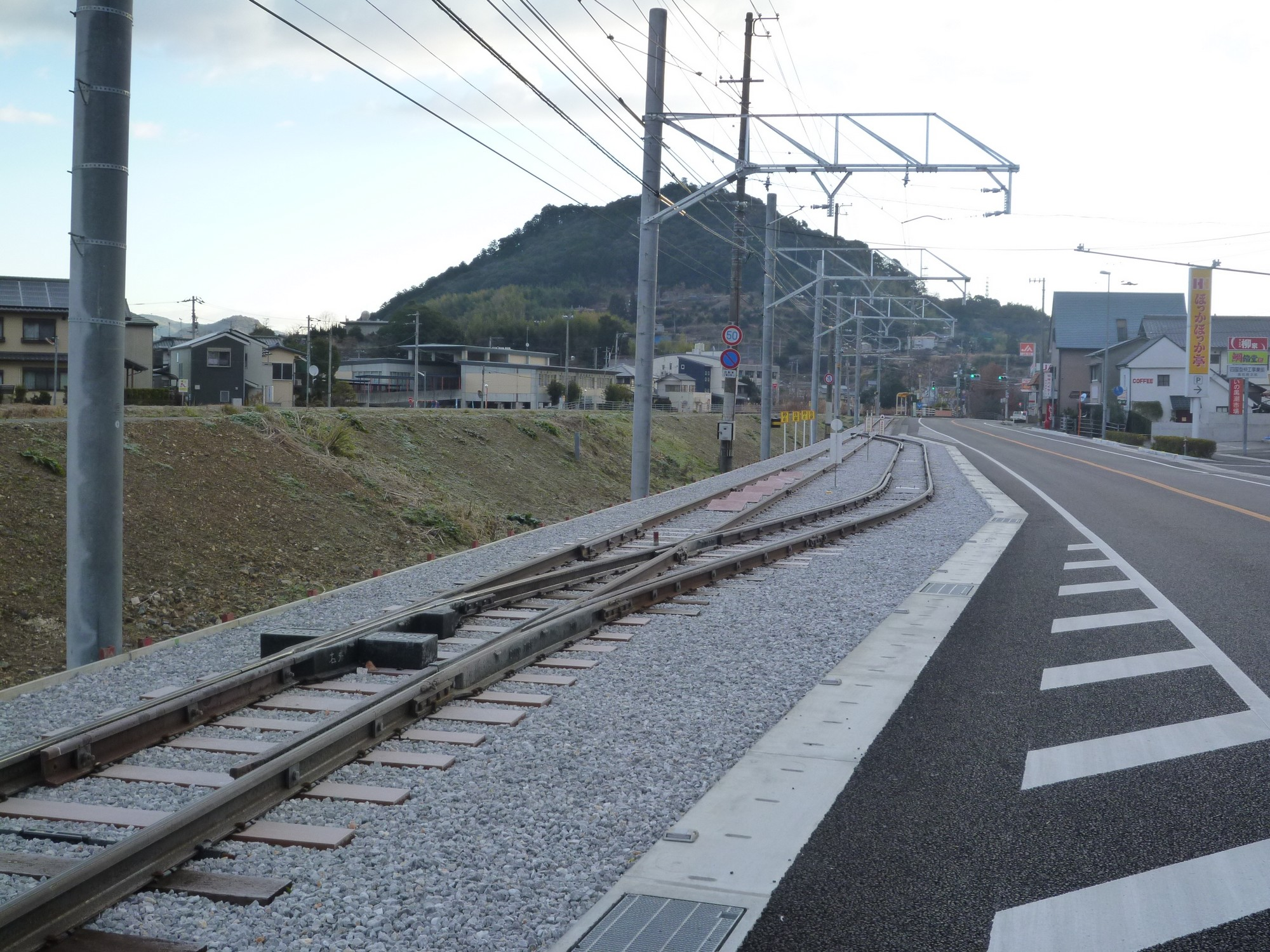 2015年1月2日撮影。